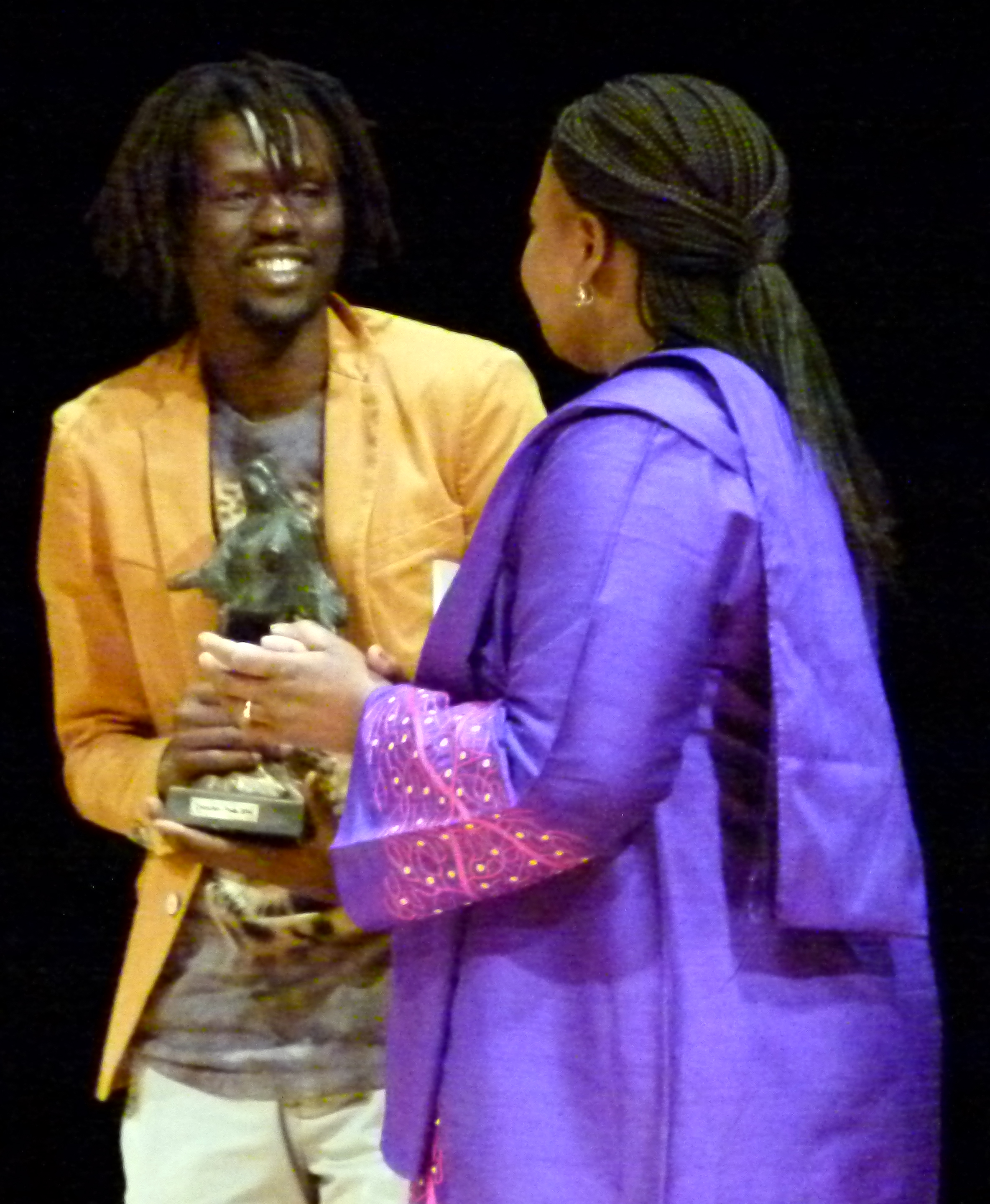 Emmanuel Jal, Verleihung des Dresdner Friedenspreises "Dresden Preis" am 16.2.2014 durch Fatou Bensouda in der Dresdner Semperoper, Dresden